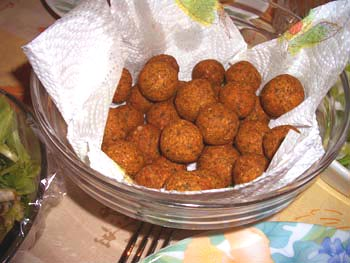 Photo de falafels Photo prise par Jerem 画像:Photo de falafels.jpg